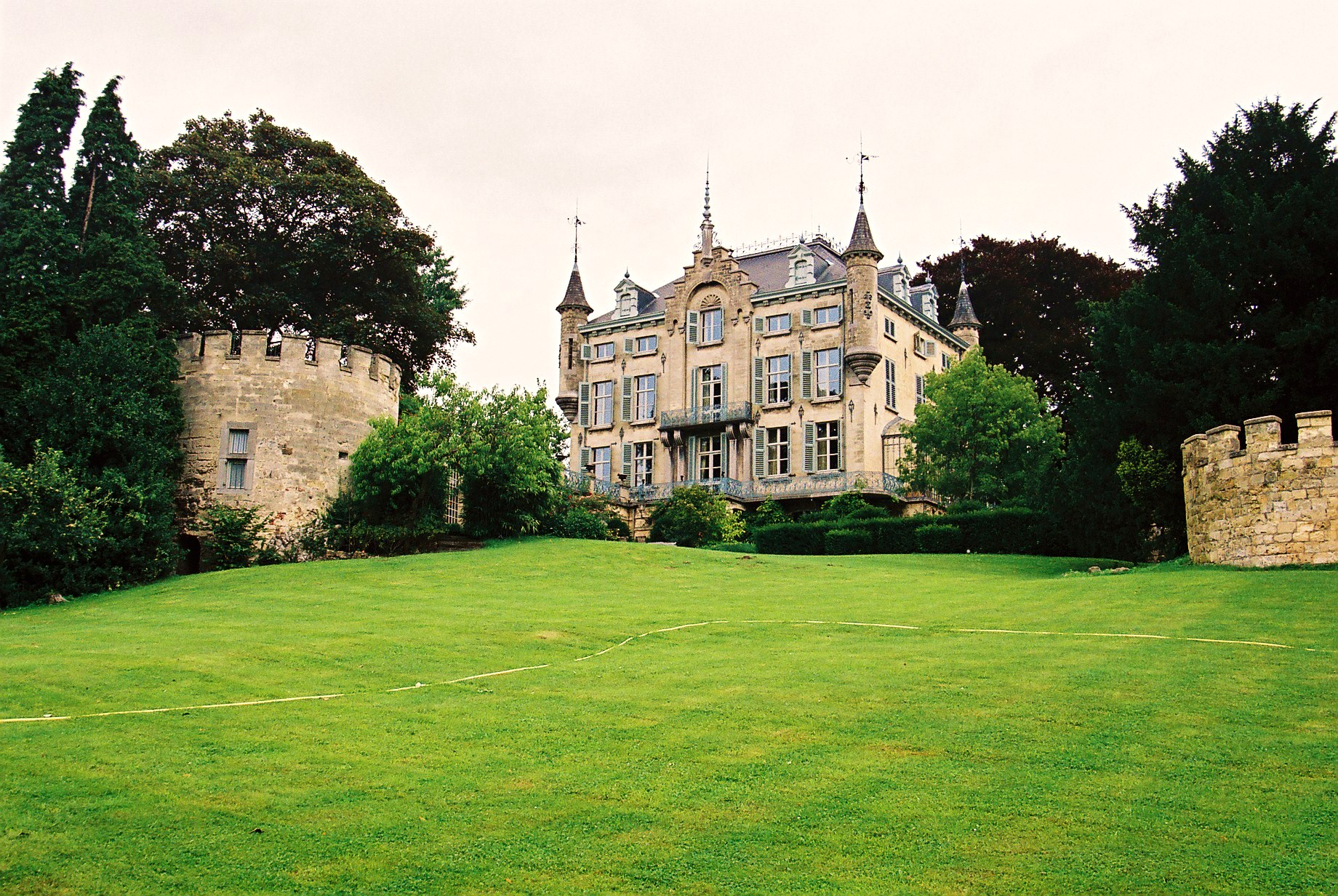 Kasteel Gronsveld te Gronsveld.